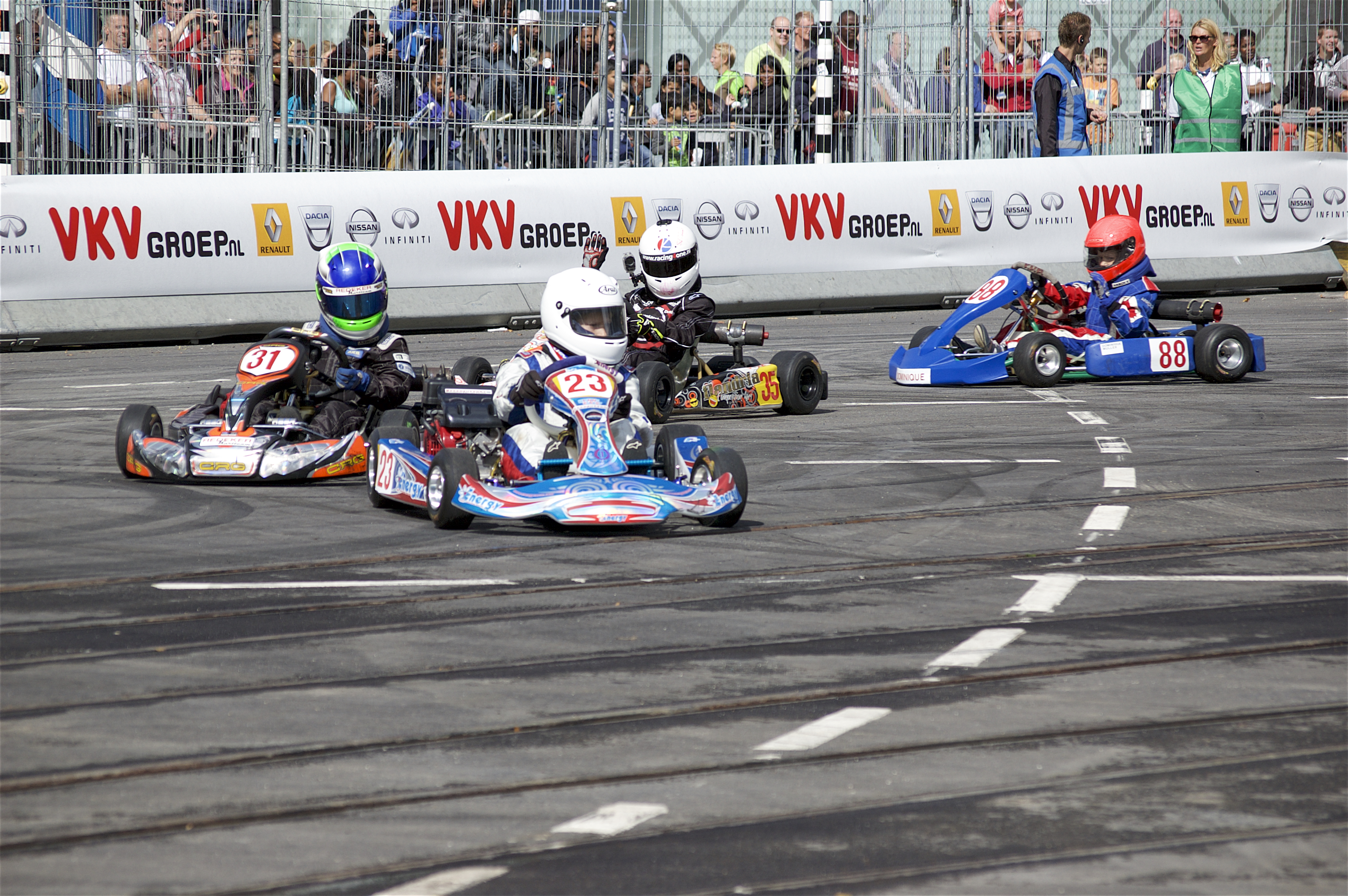 City Racing Rotterdam.